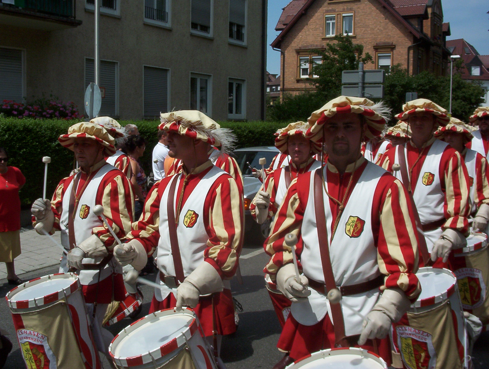 Der Seehasenfanfarenzug beim Festumzug des Seehasenfestes